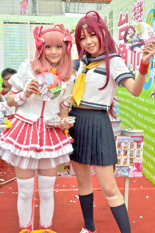 第18屆開拓動漫祭，台灣角川書店攤位，台灣角川書店10周年原創角色「川川」（左）、「角角」（右）cosplayer。